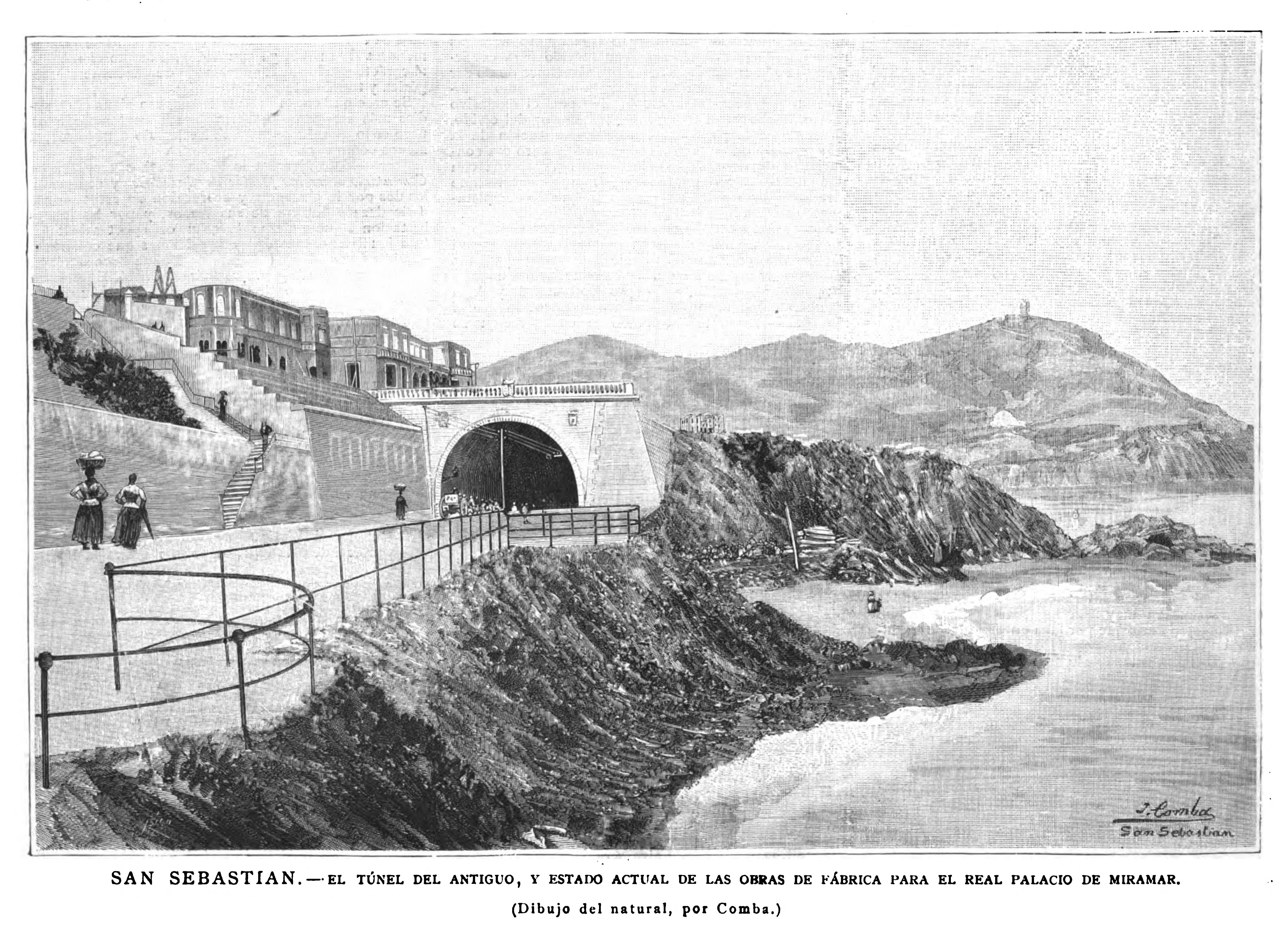 San Sebastián.—El túnel del Antiguo, y estado actual de las obras de fábrica para el Real Palacio de Miramar. Dibujo del natural, por Comba.